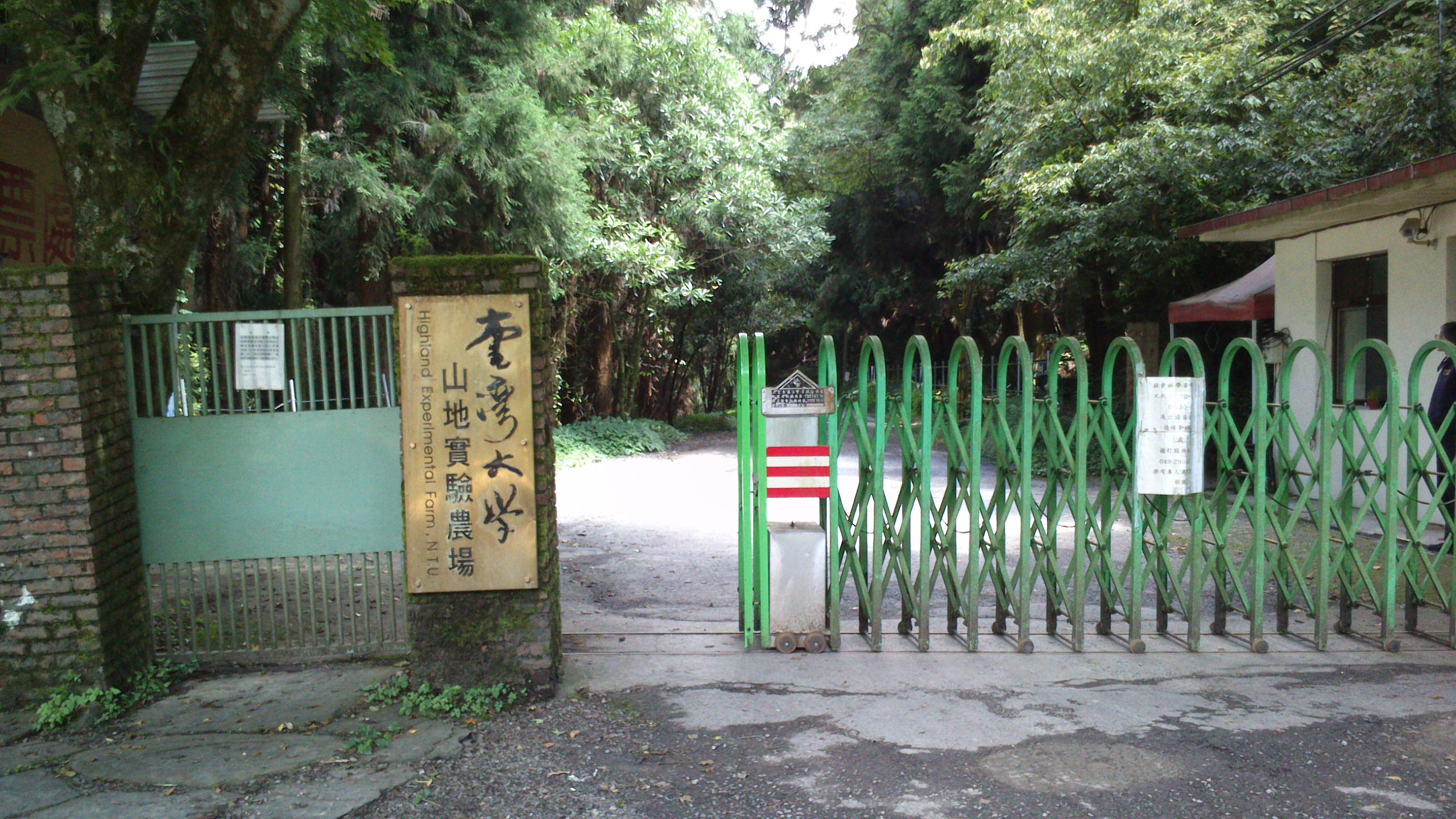 國立臺灣大學生物資源暨農學院附設山地實驗農場大門。